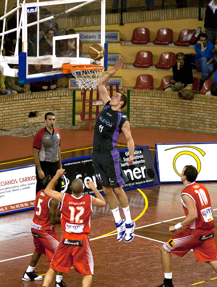 Partido disputado en el Pabellon Marta Domínguez de Palencia, entre el Faymasa Palencia y el Gestibérica Ciudad de Vigo